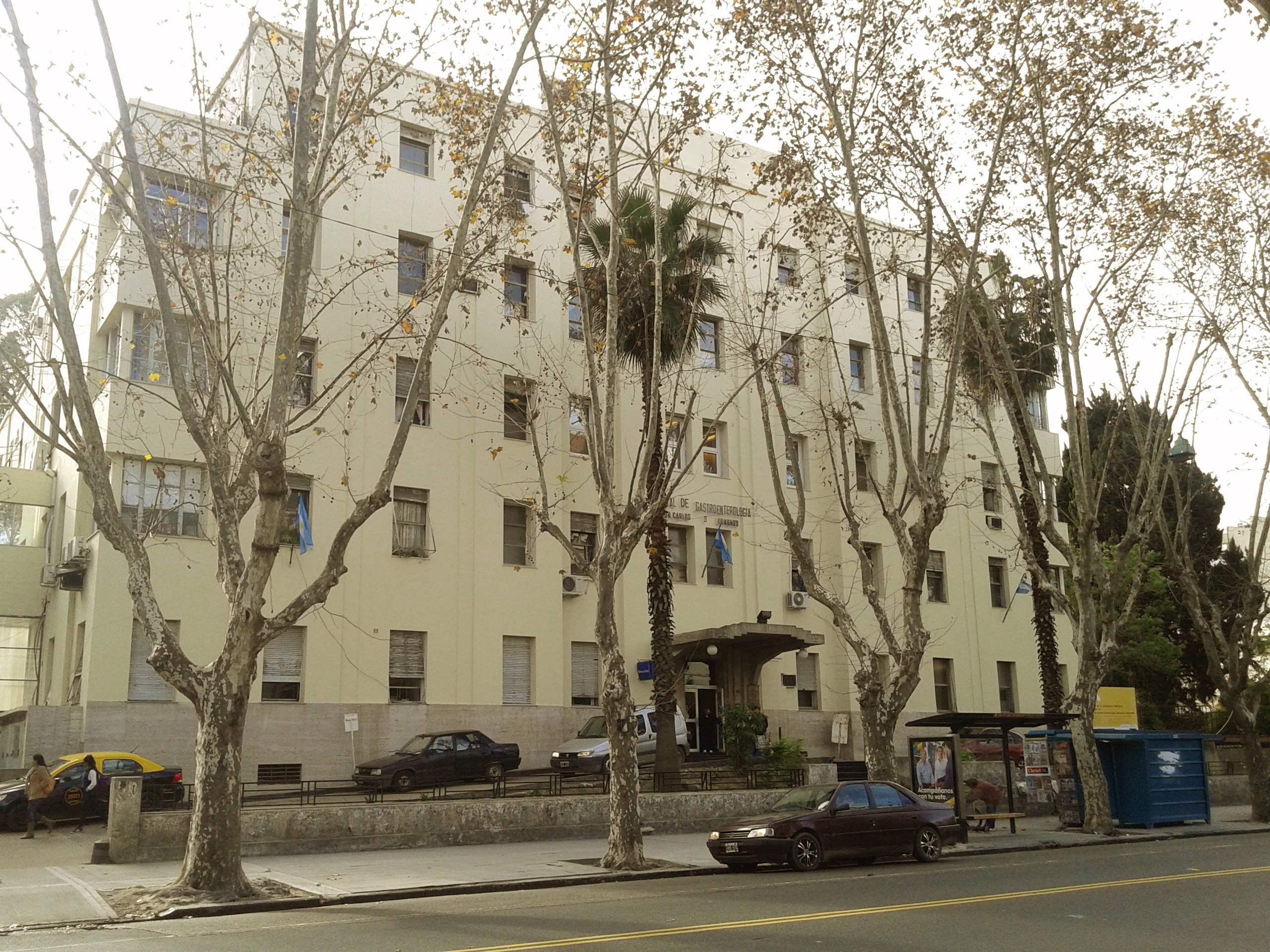 Hospital de Gastroenterologia Dr. Carlos Bonorino Udaondo - Buenos Aires - Argentina